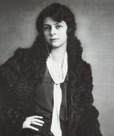 Księżna Feodora Sułkowska z domu Hardegg auf Glatz und im Machlande